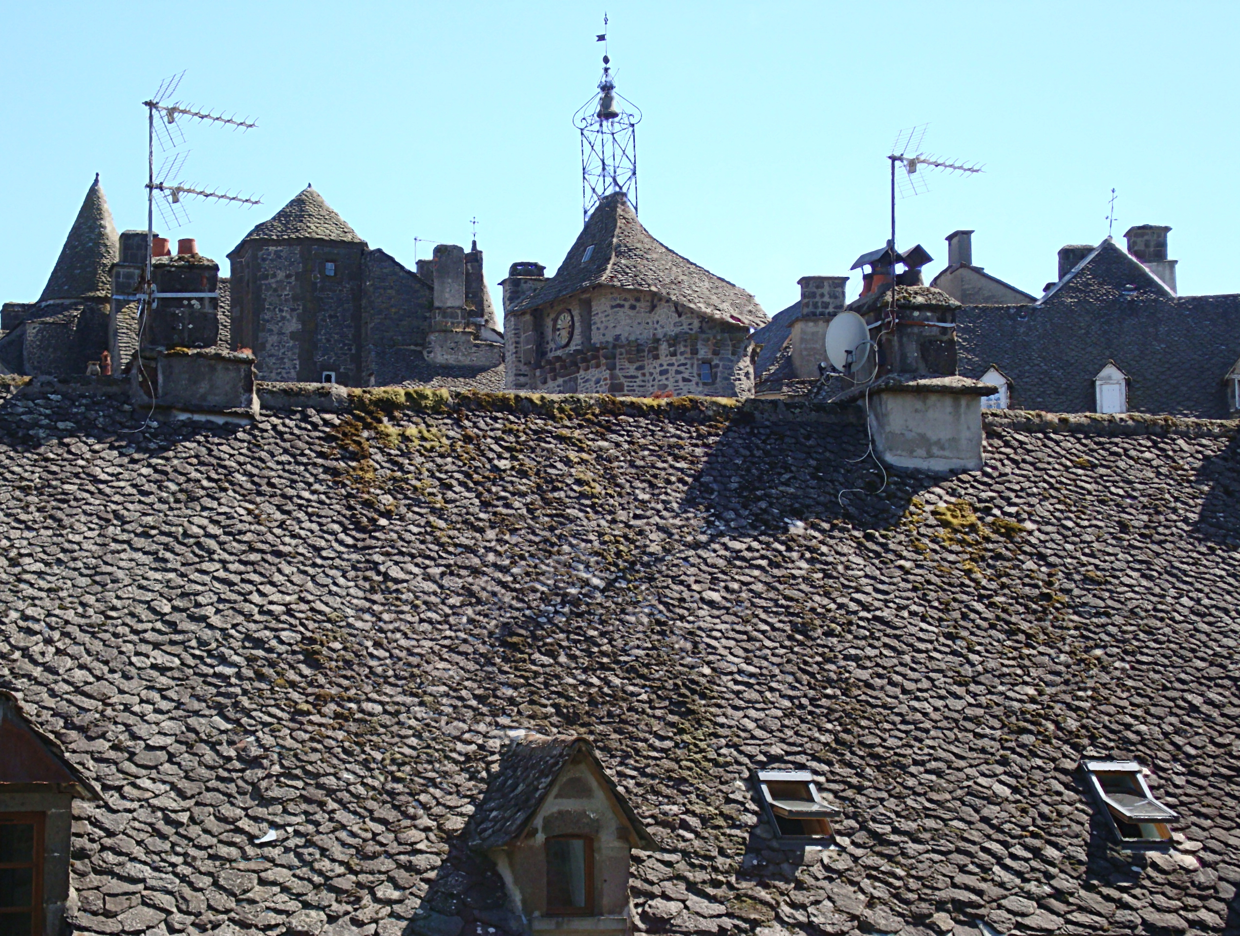 Toîts de lauze à Salers (Cantal).